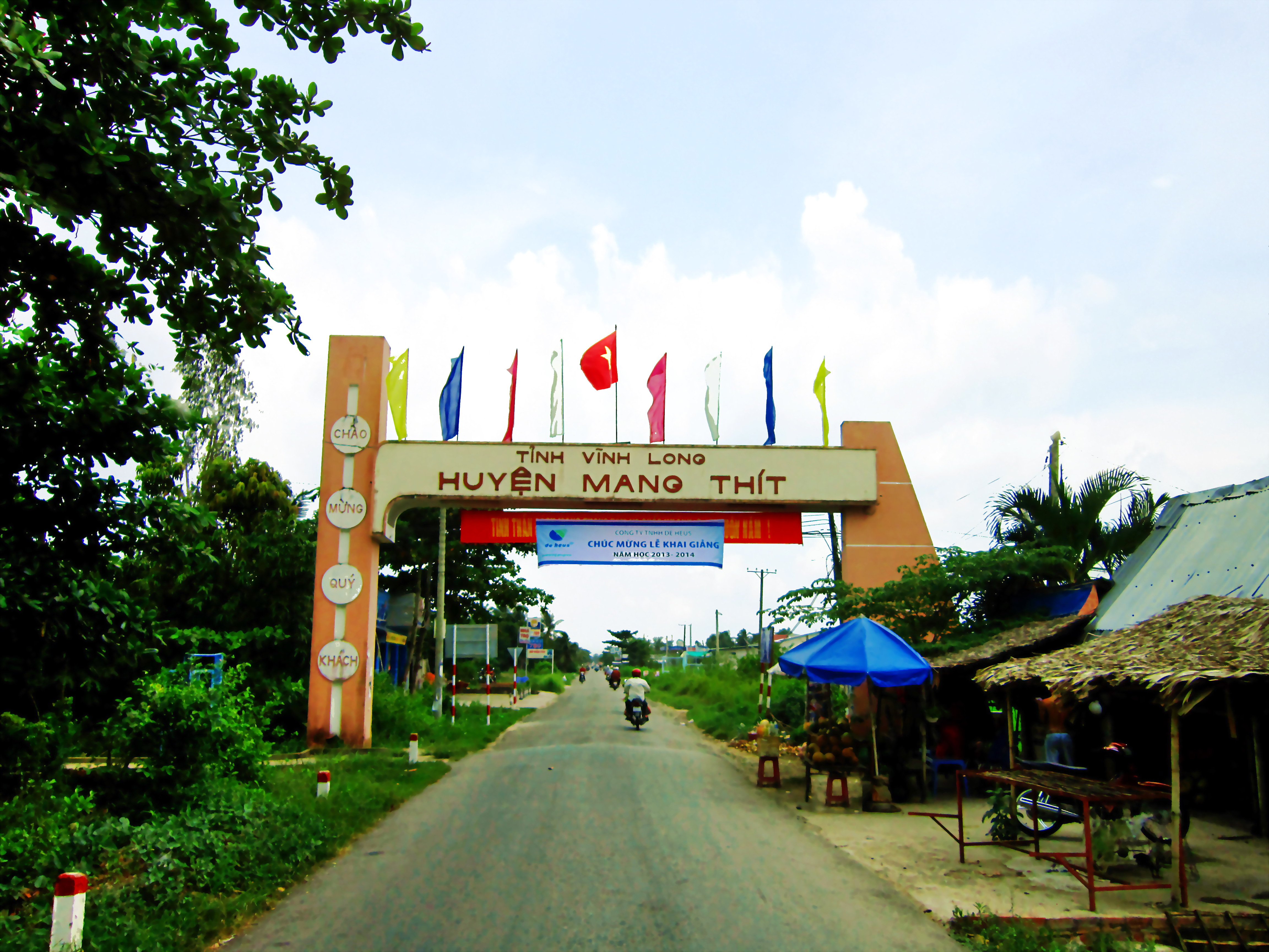 Đường vào huyện Mang Thít, thuộc tỉnh Vĩnh Long, Việt Nam.